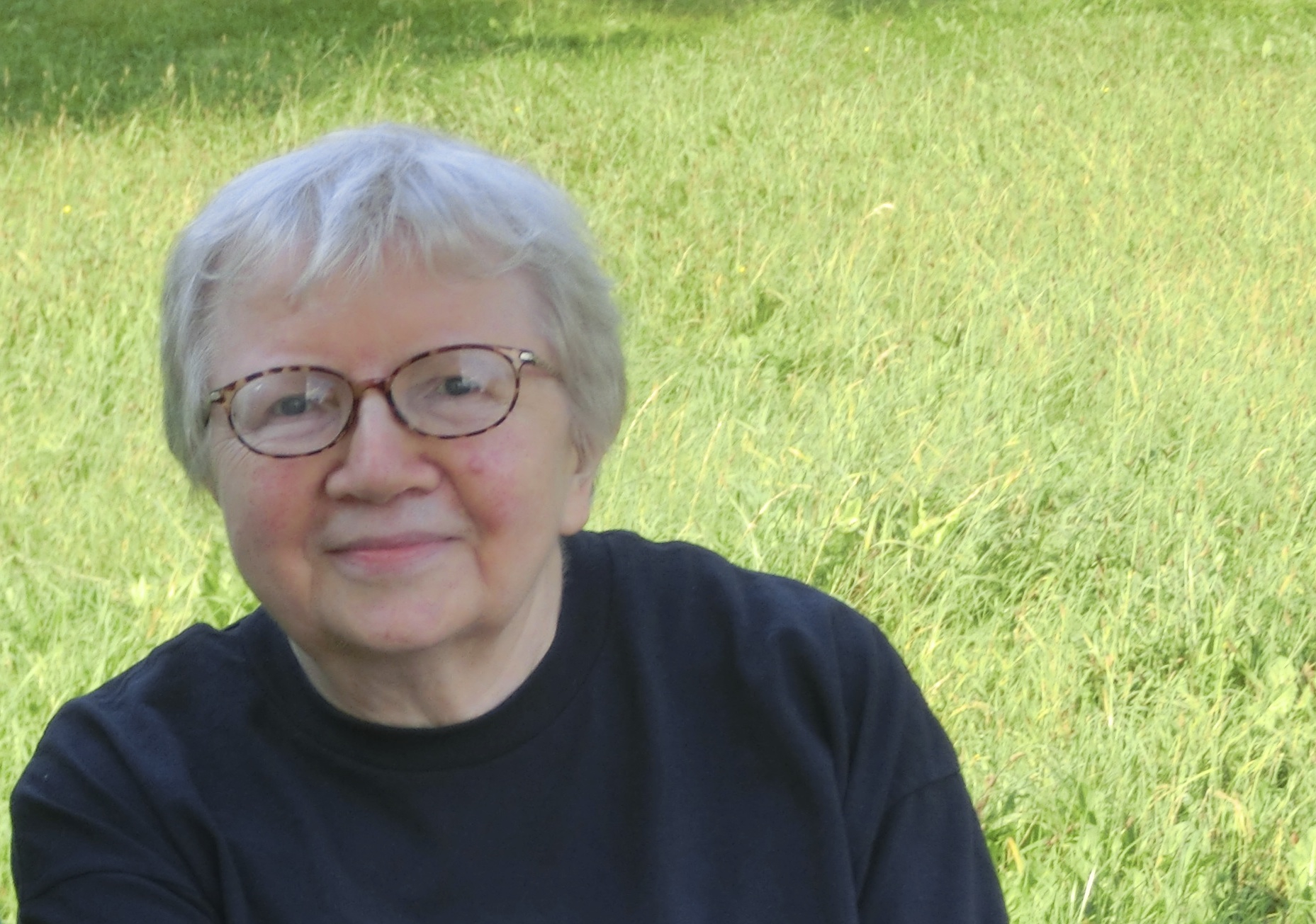 Prof. Dr. Luise F. Pusch im September 2013